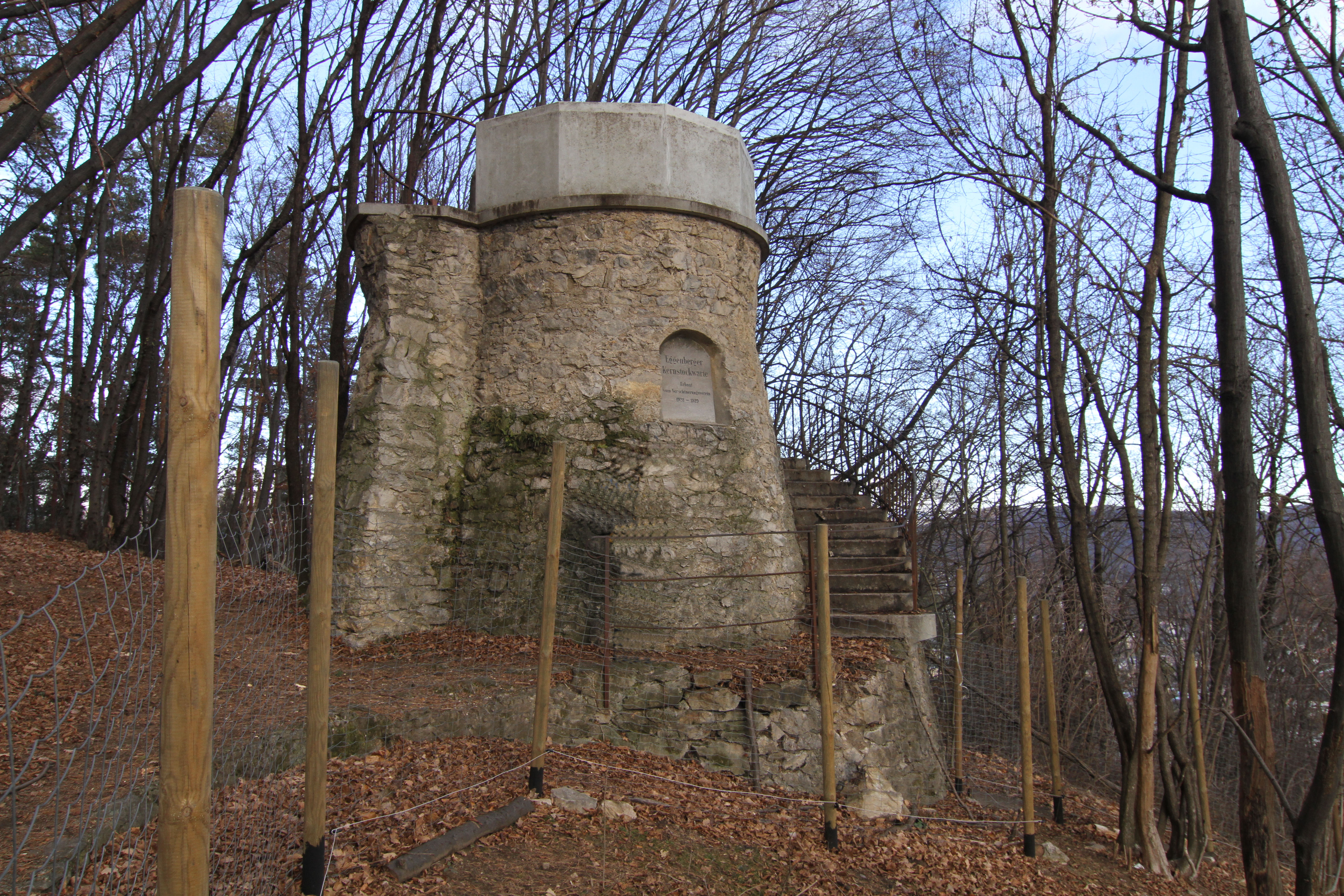 Kernstockwarte (Plabutsch), bei Weingartenweg 35, Graz, Österreich